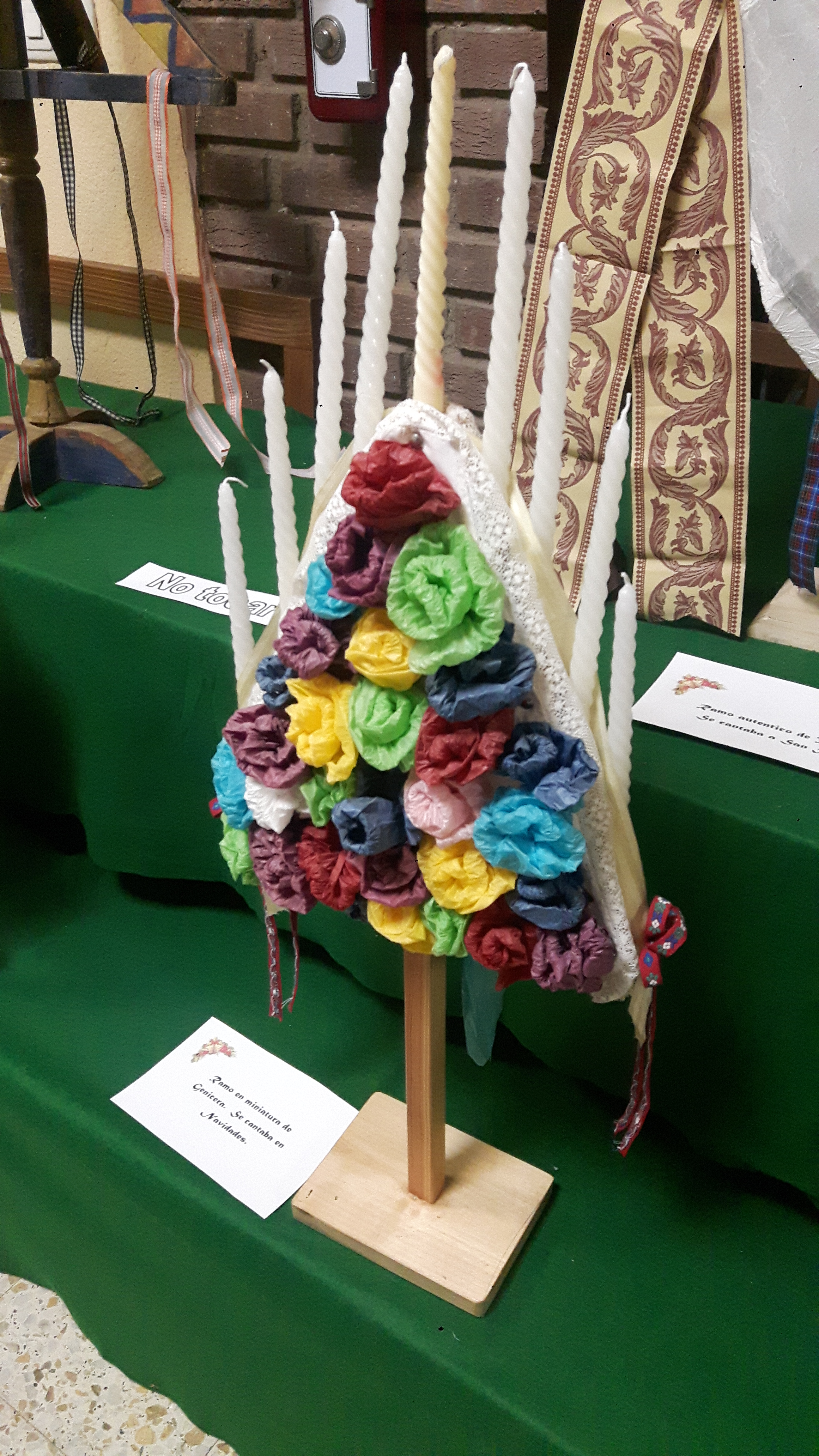 Ramo leonés tradicional de Genicera en miniatura en la Exposición de Ramos Leoneses de Puente Castro de 2018